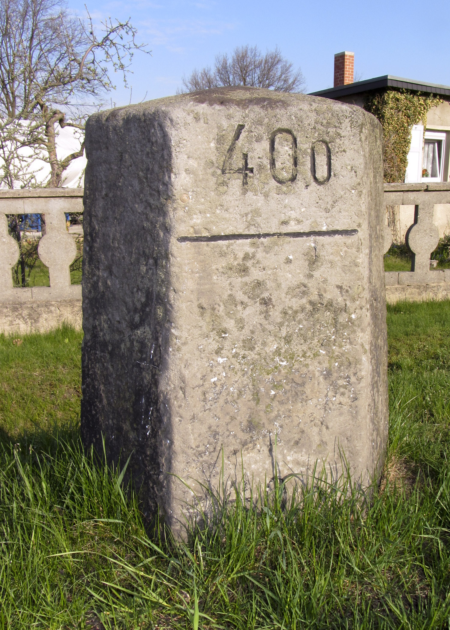 Preußischer Meilenstein (0833) Sechskantstein / Myriameterstein, Chausseestraße 19, B 100 in Gossa. Beschriftung: 40o | -------- | 40,o Bemerkung: Versetzt nein, Höhe 1,1 m